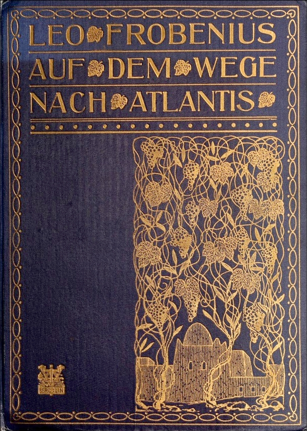 Cover page from Expeditionsbericht der Zweiten Deutschen Inner-Afrika-Expedition (1907-09) Auf dem wege nach Atlantis.